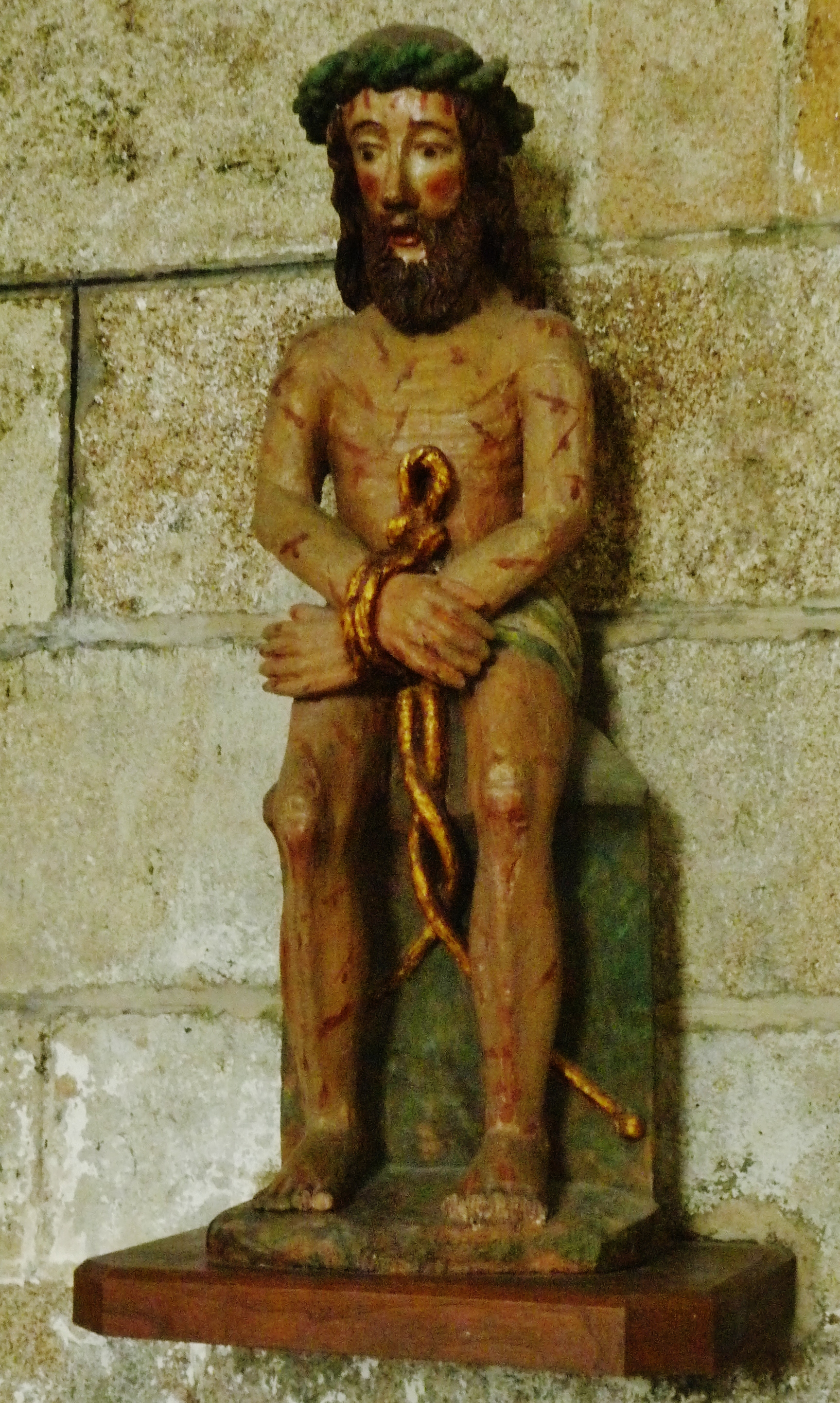 Saint-Pol-de-Léon : chapelle Notre-Dame du Kreisker, Christ aux liens